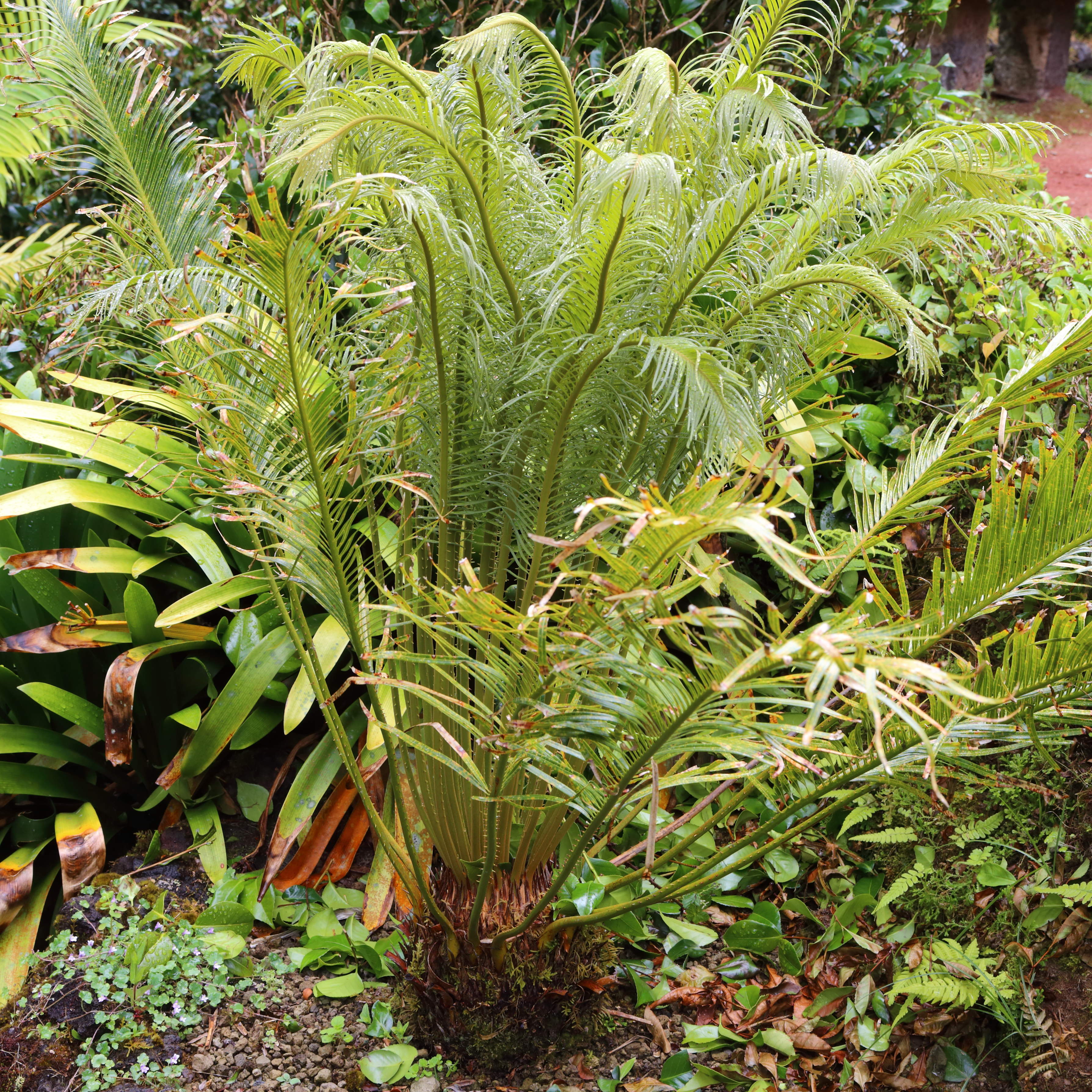 Cycas angulata i parken Terra Nostra, Furnas, Azorerna.